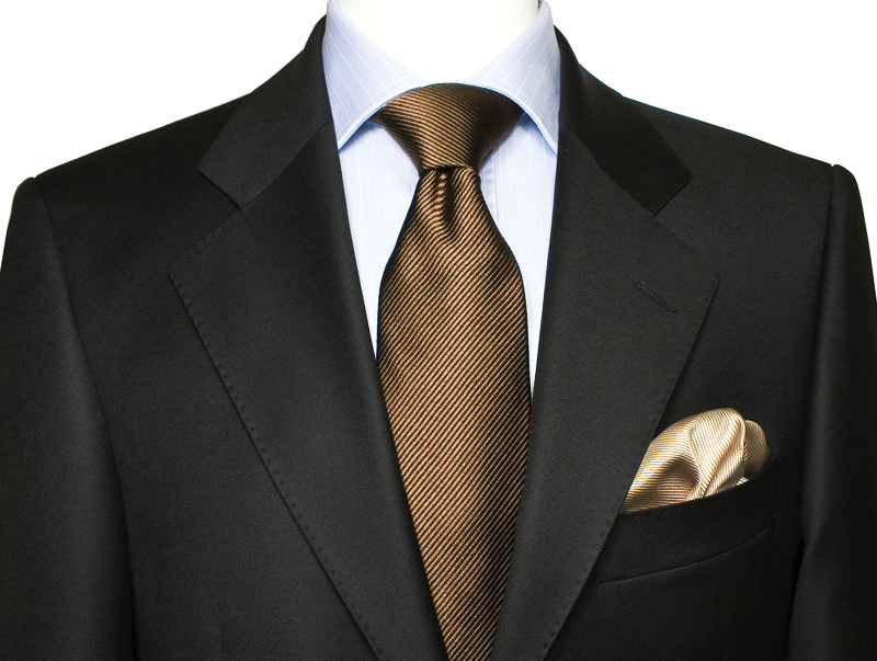 Svart dress.